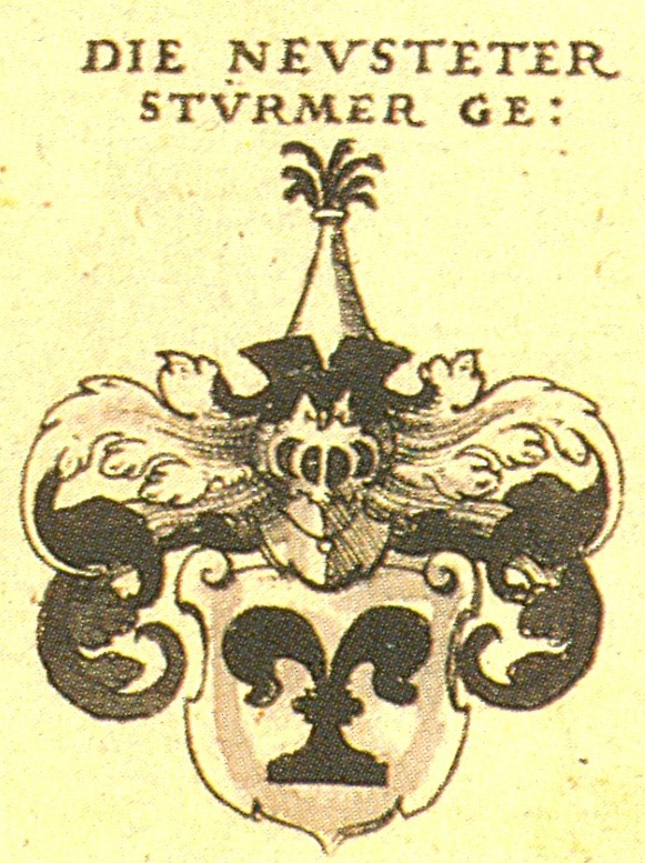 Wappen der fränkischen Adelsfamilie der Neustädter genannt Stürmer.